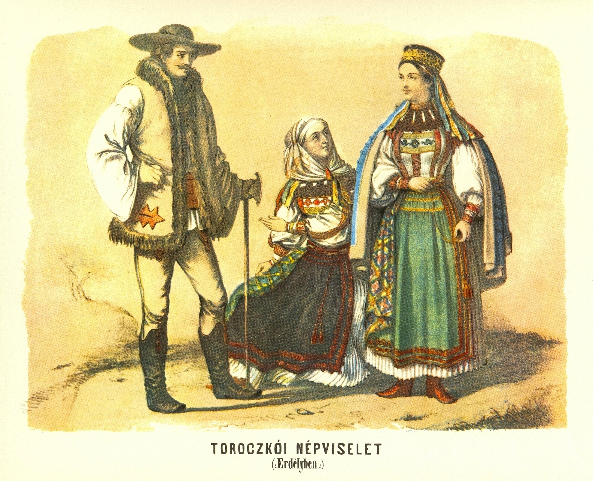 Rimetea, localnici în port naţional (1854).